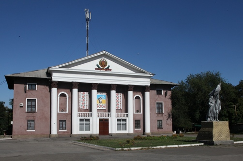 Центральное ДК шахты "Белореченская"